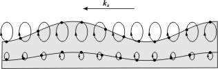 Schemat propagacji fali Rayleigha